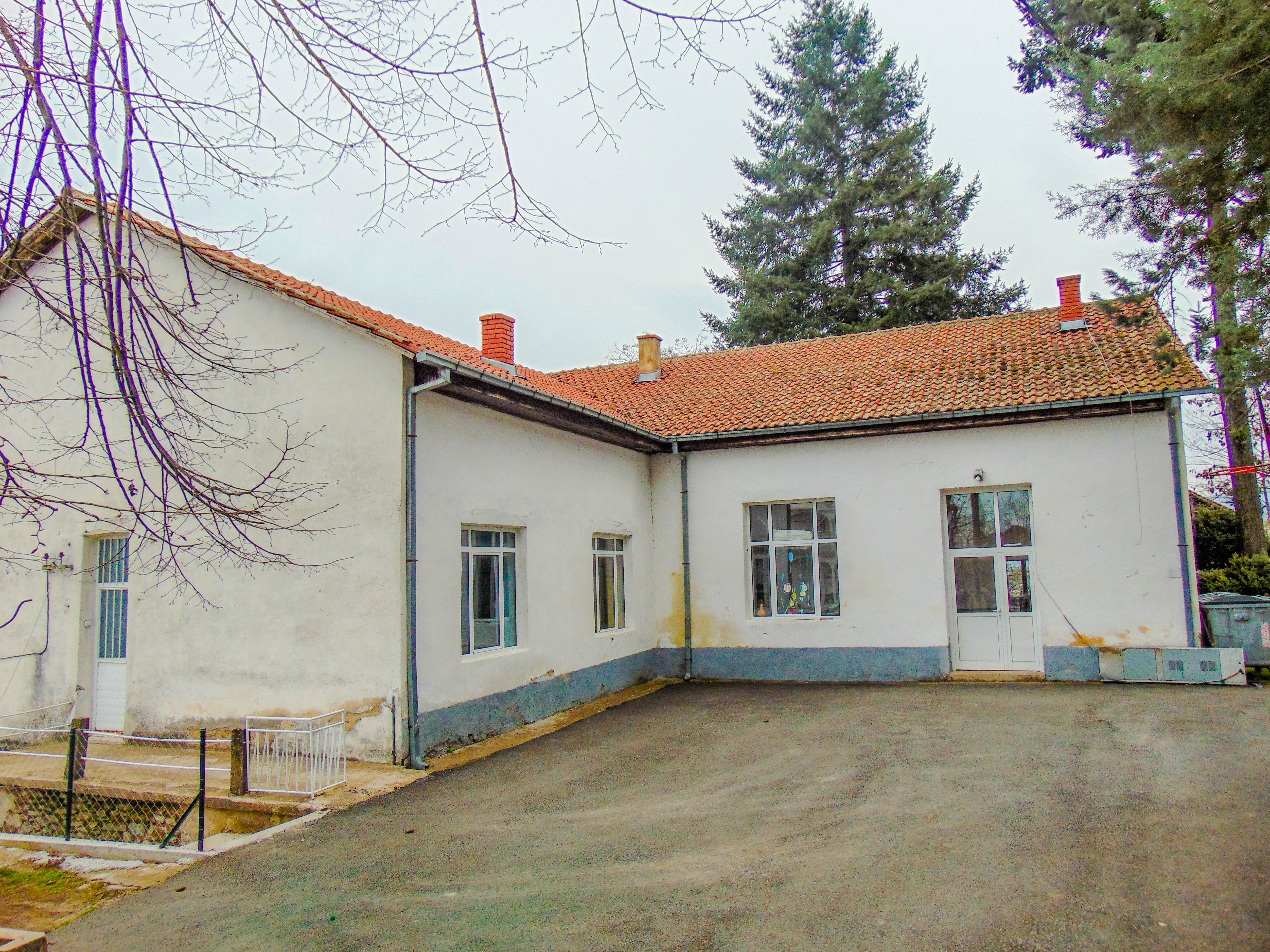 ОУ „Мануш Турновски“ - Дражево